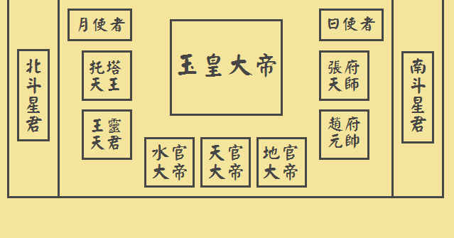 中文（台灣）: 文武聖殿五樓凌霄寶殿平面圖；使用本圖片請遵循(CC 姓名標示-非商業性-禁止改作)，Please follow (CC BY-NC-ND 3.0 TW)